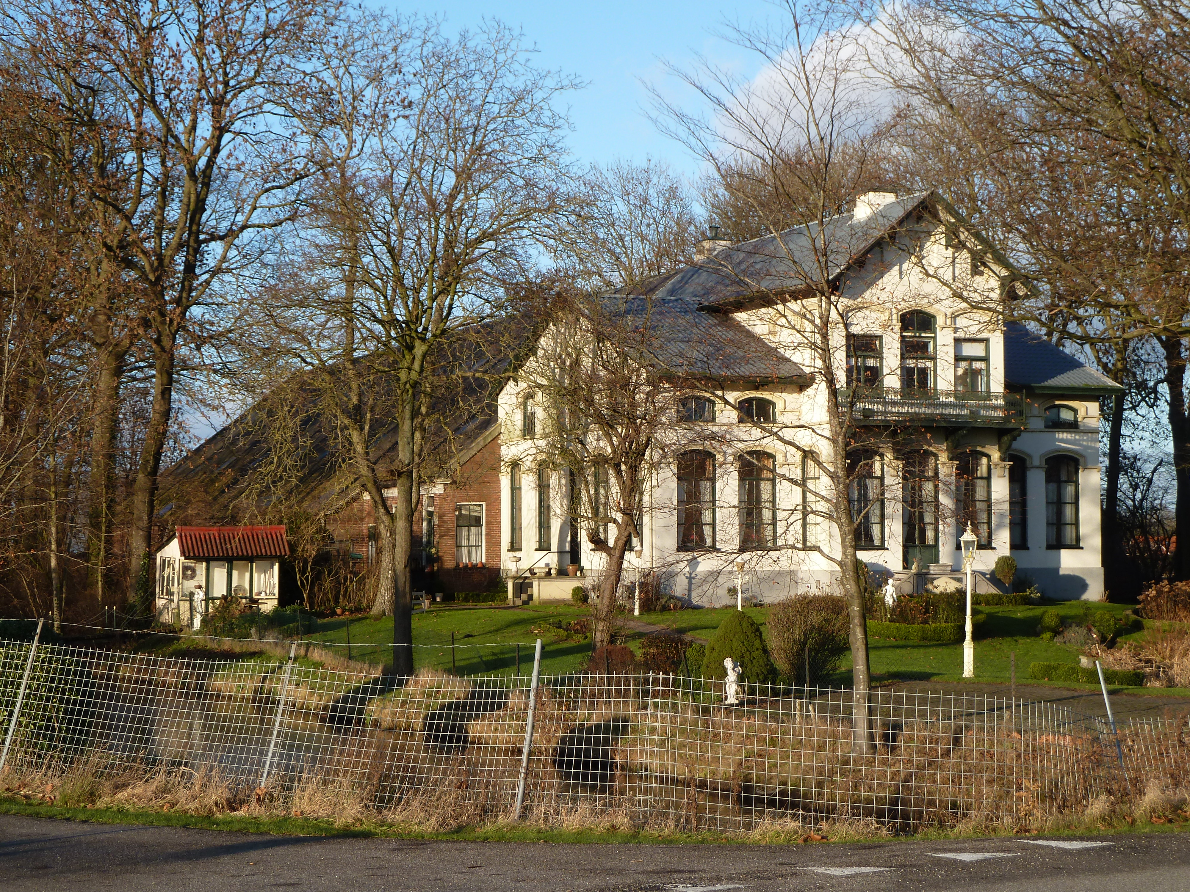 Oldambtster villaboerderij in eclectische stijl aan de Menterneweg 5 bij het Groningse dorp Midwolda.